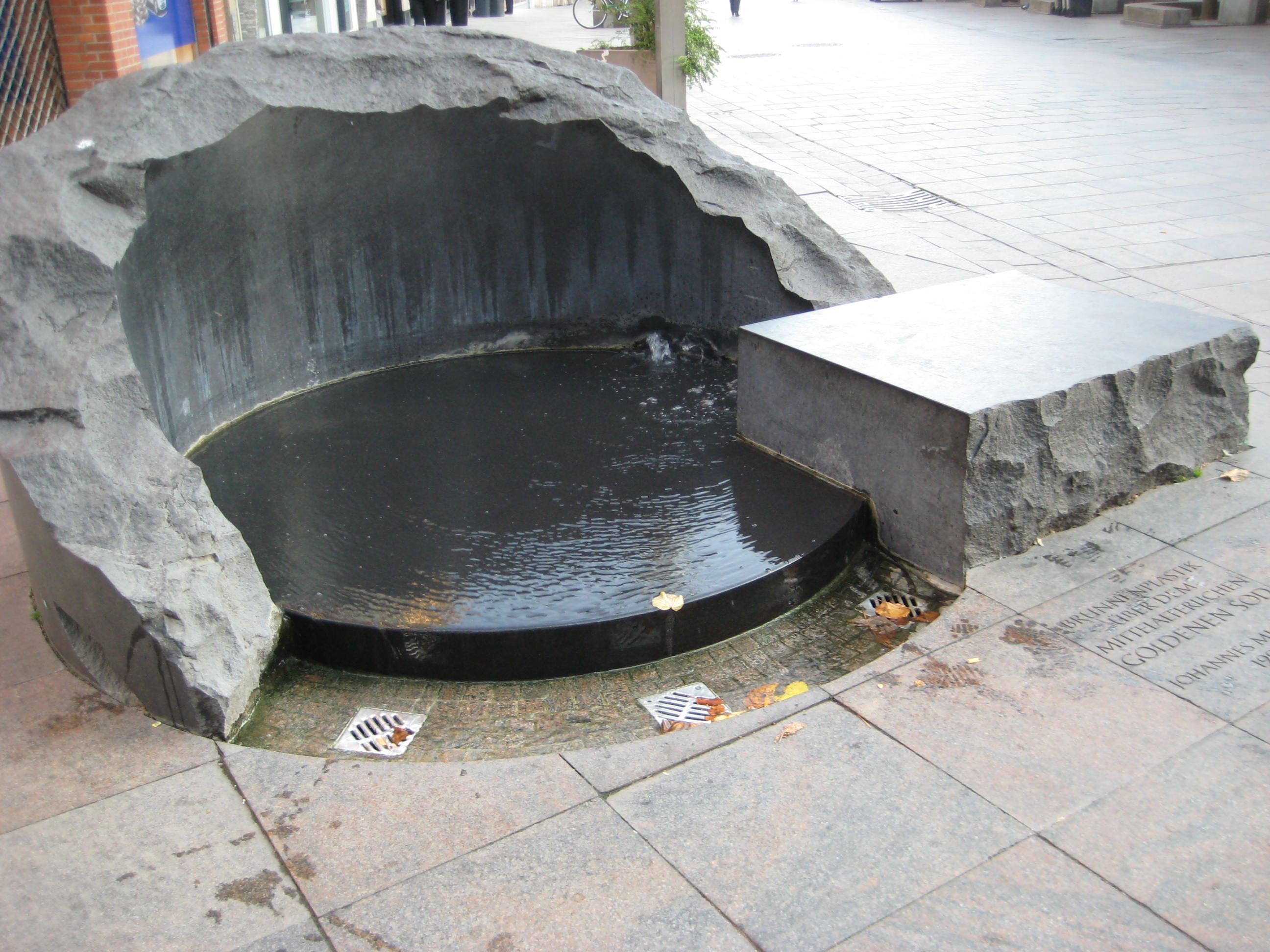 Brunnen "Goldener Sod" in Lübeck an der Ecke Breite Straße/Mengstraße, Brunnenplastik aus schwedischem Granit (Gotland?) von Johannes Michler, errichtet über dem mittelalterlichen "Goldenen Sod"